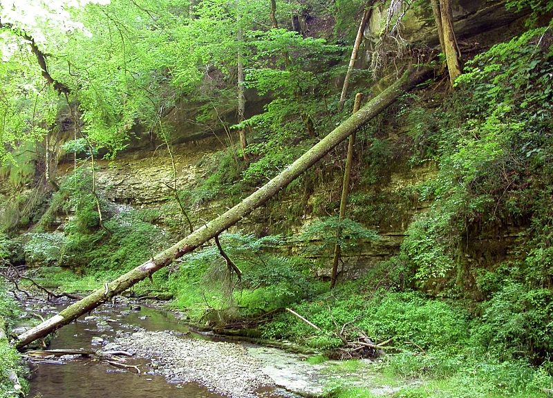 Wutachschlucht, Schwarzwald, Deutschland, Germany